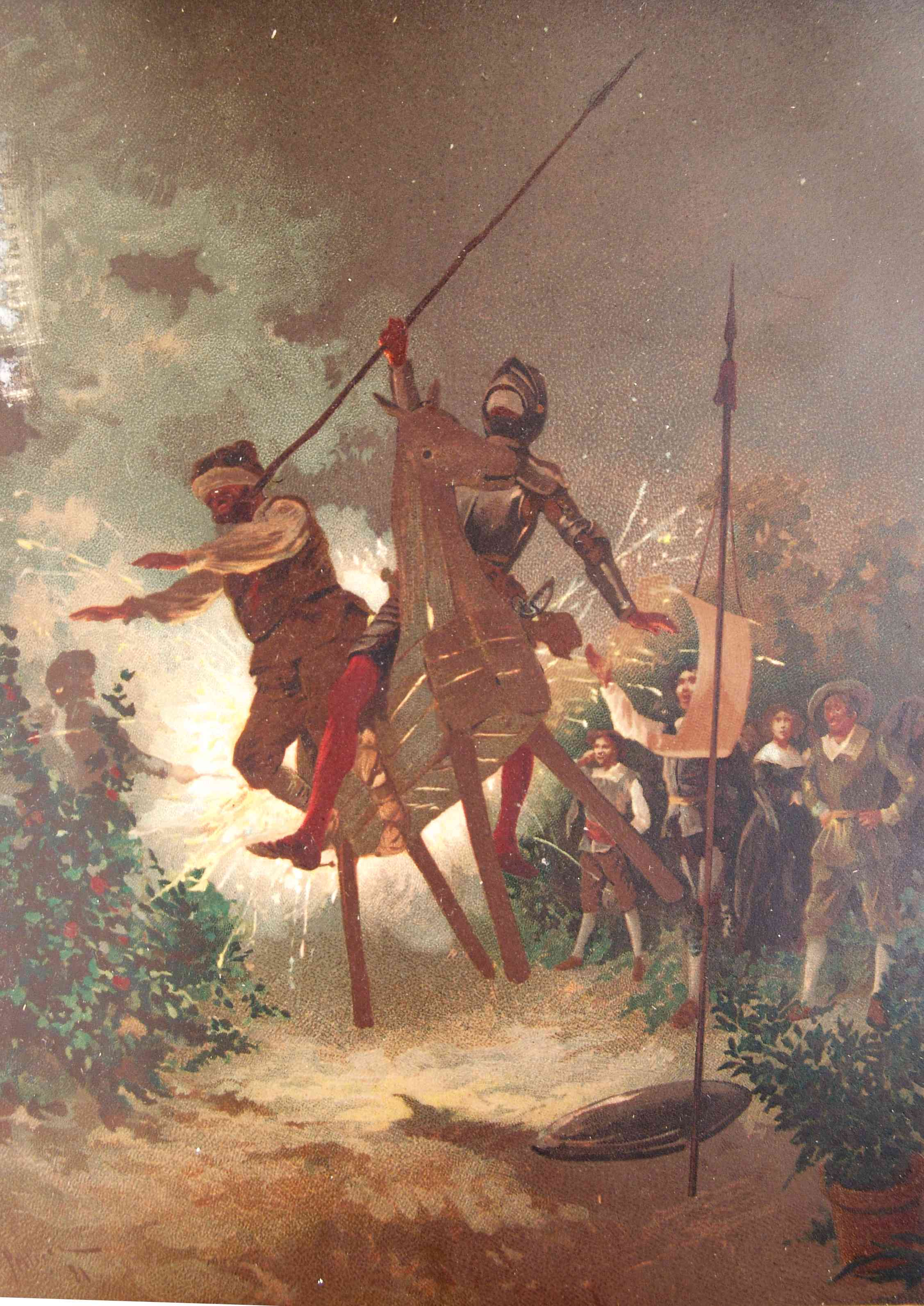 202_224_quijote_cap41